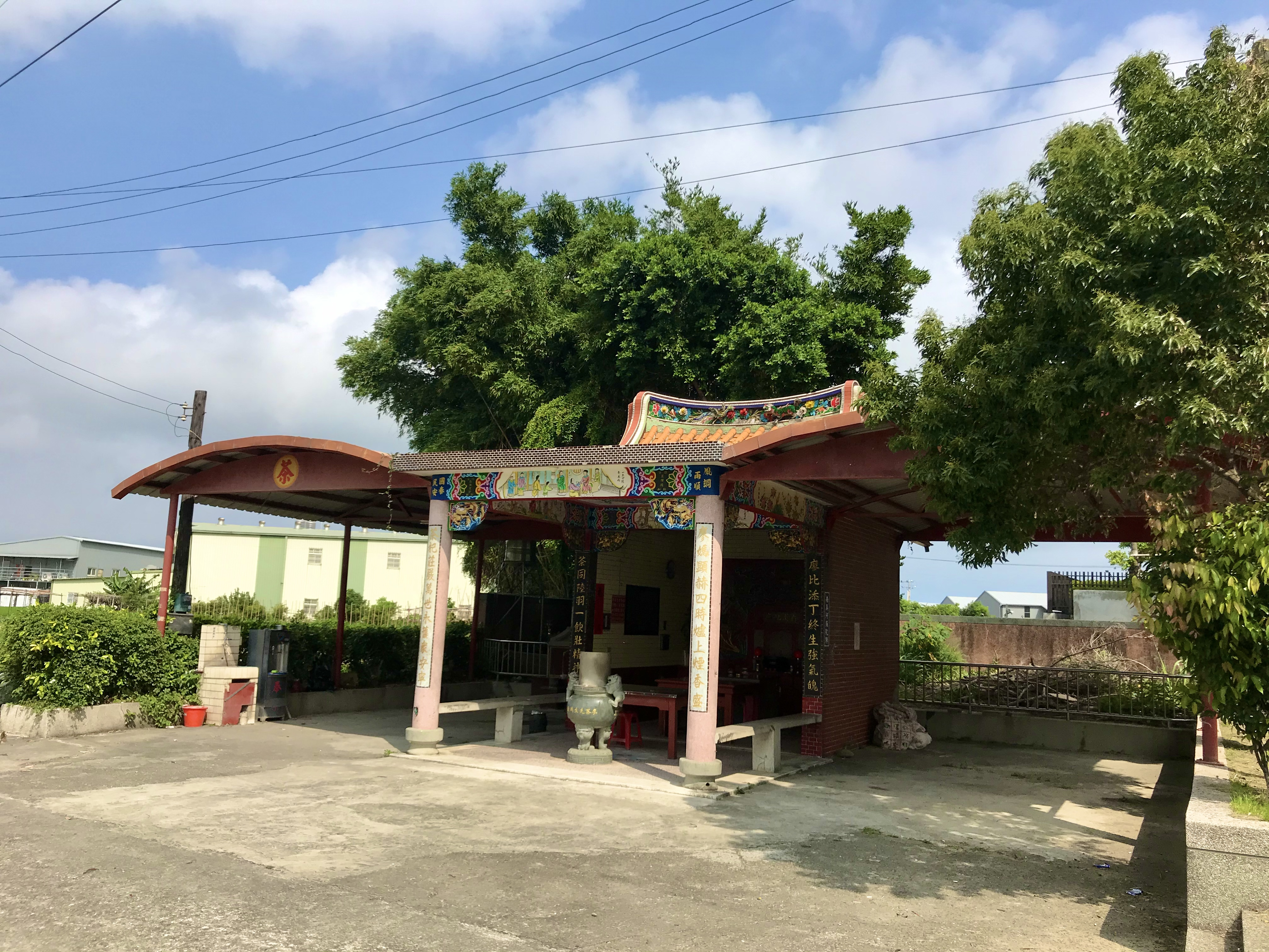 廖茶先生媽廟斜照